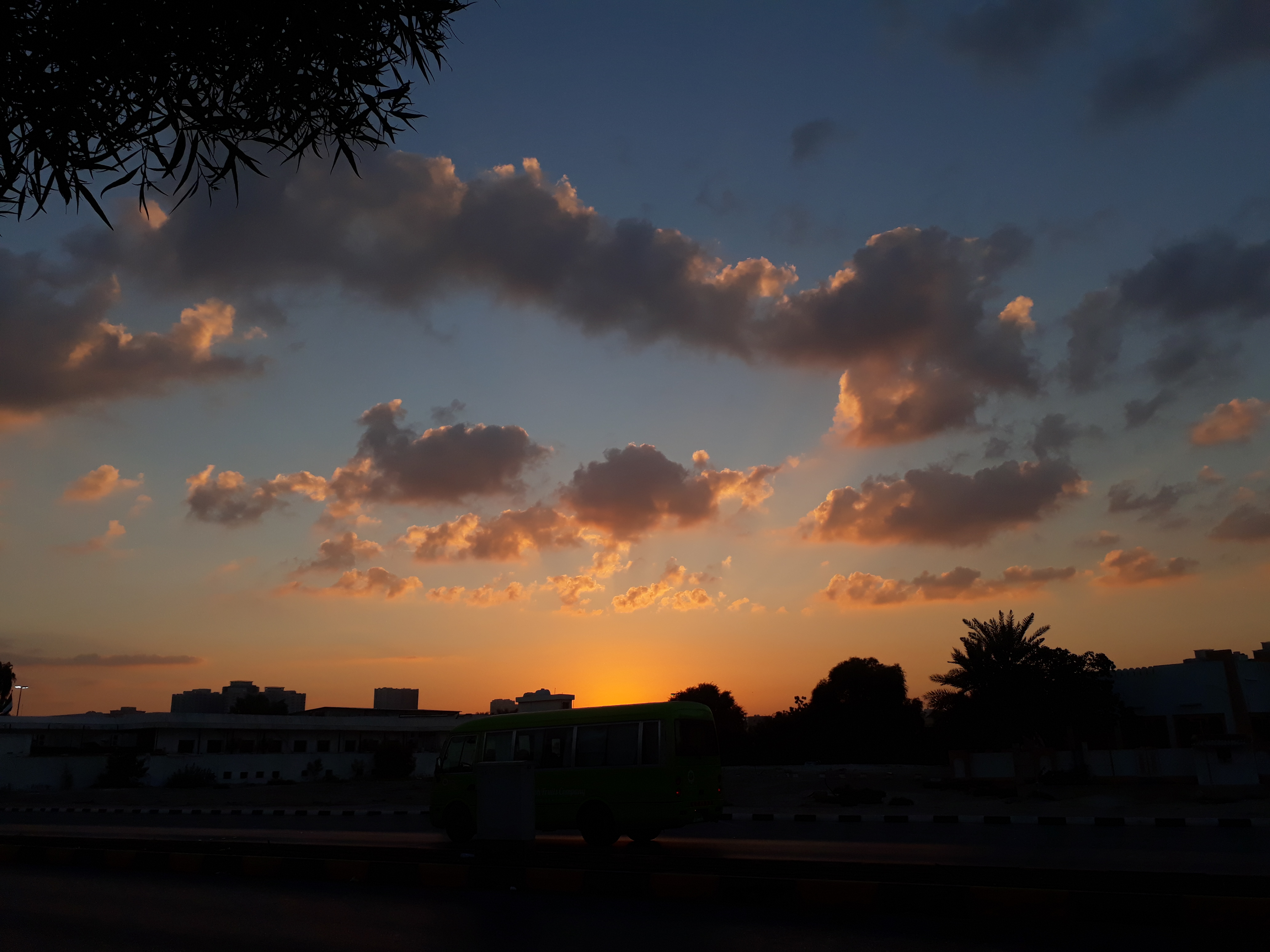 മഞ്ഞ നിറമുള്ള ആകാശം